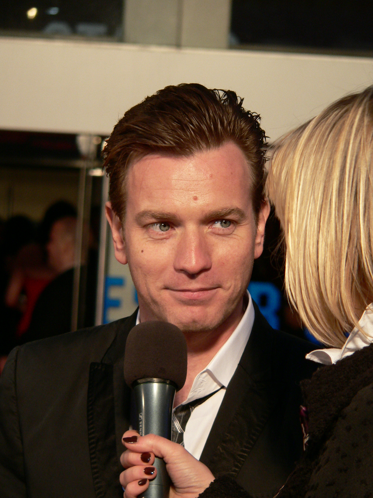 Ewan McGregor